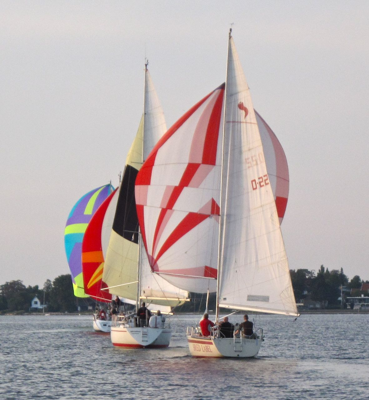 Sejlads med spilere i let vind.